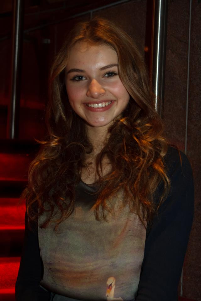 Dit portret is gemaakt tijdens de eerste voorstelling van de musical Annie op 20 november 2012 in Theater de Lievekamp in Oss.